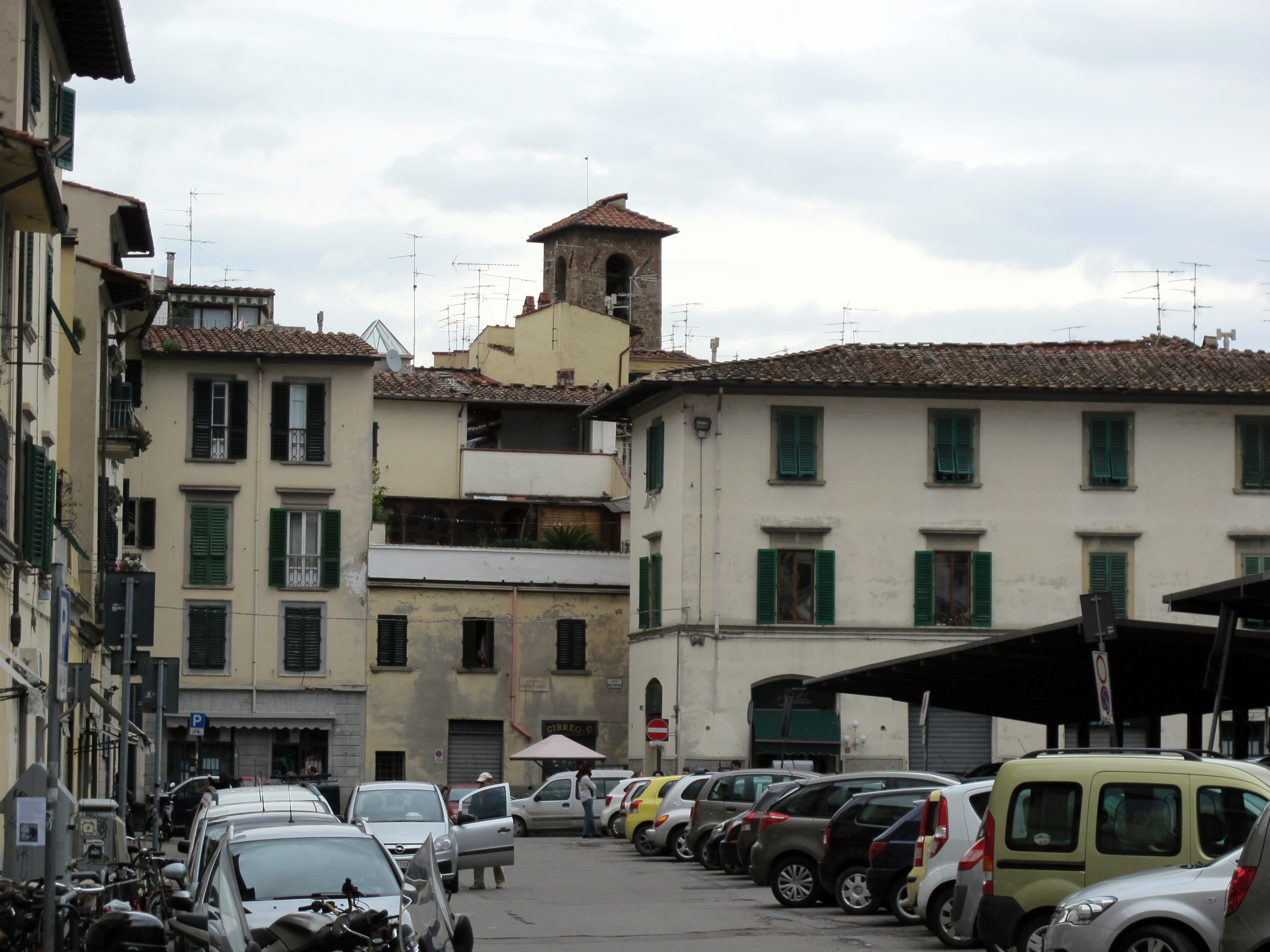 Piazza ghiberti, campanile di sant'ambrogio